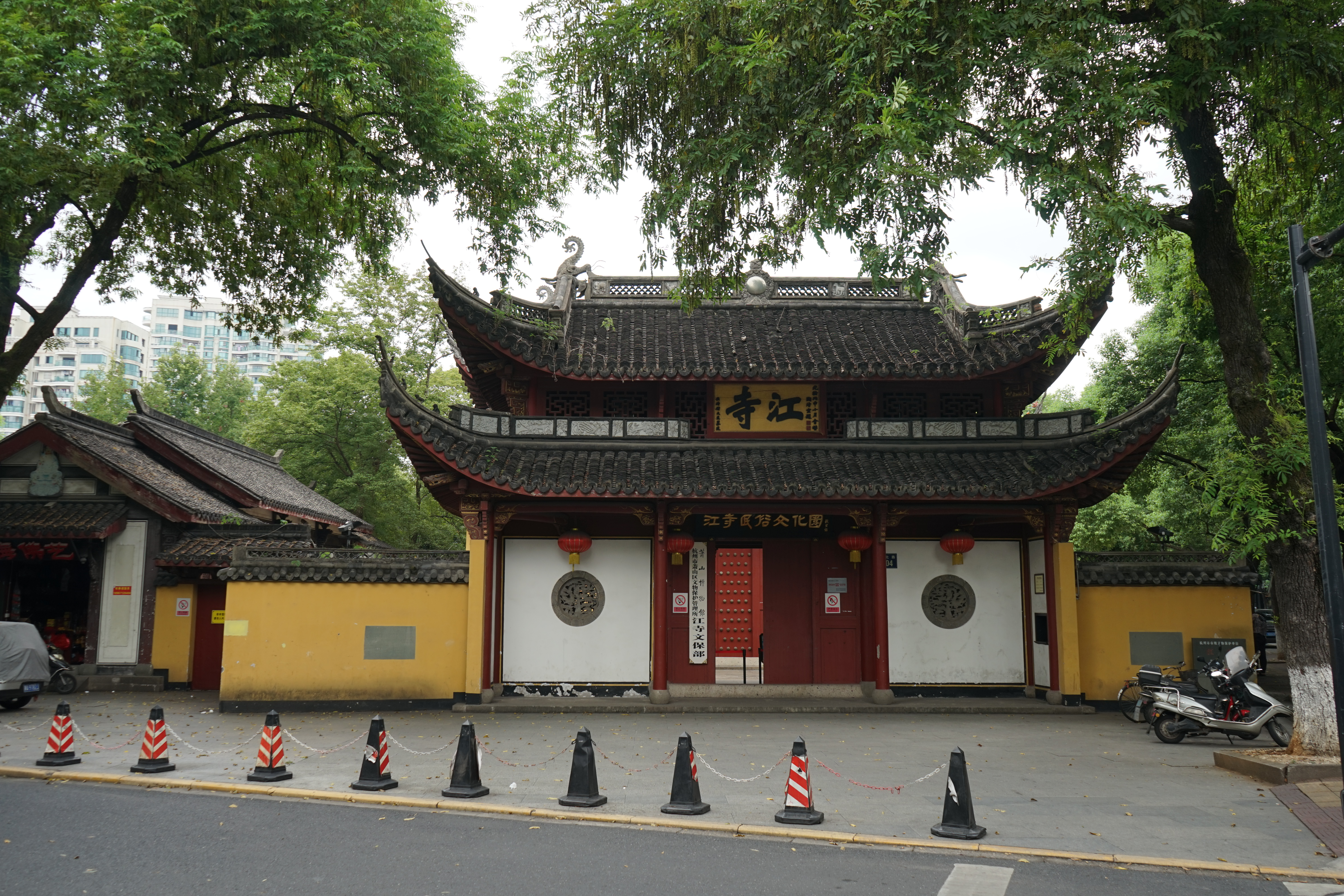 萧山 江寺 山门